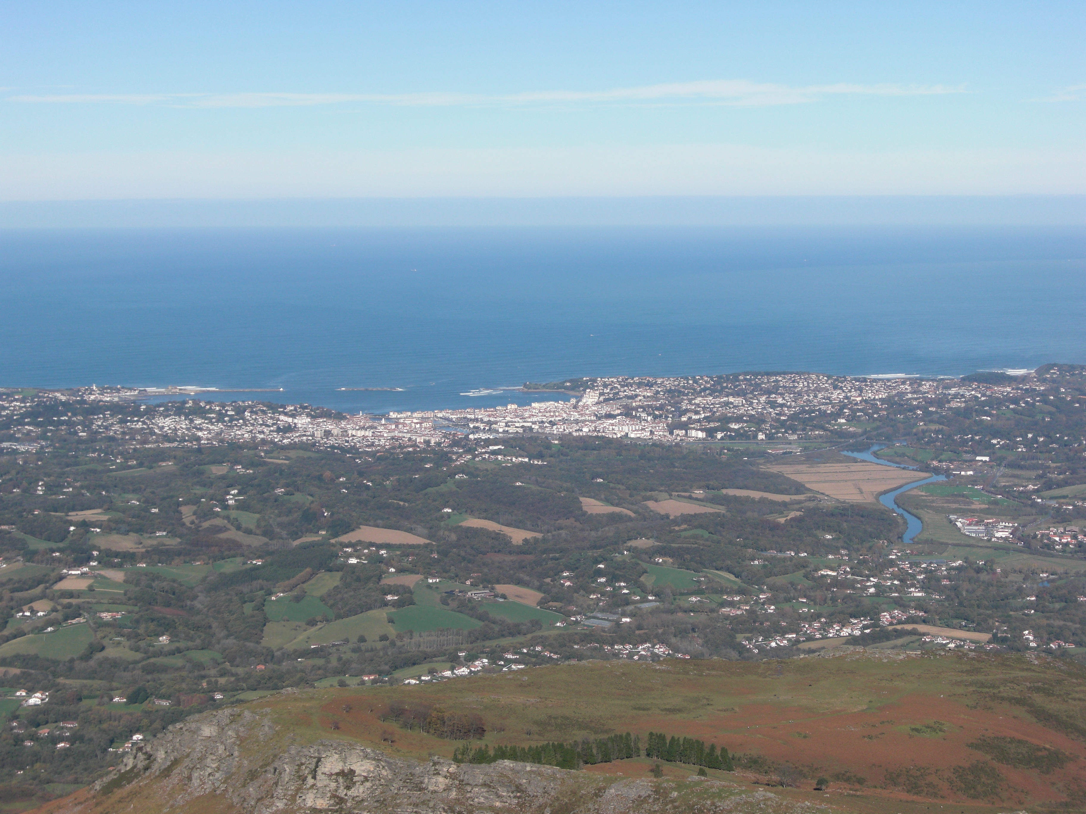 Donibane Lohizune udalerria Larrun menditik. Lapurdi, Euskal Herria. Saint Jean de Luz village from Larrun mountain. Labourd, Basque Country.